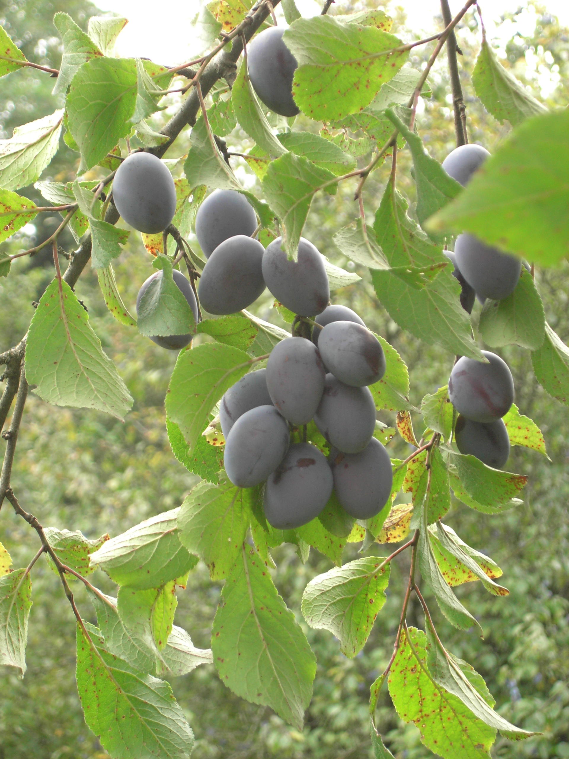 reife Zwetschgen am Zweig / ripe prunes on a twig